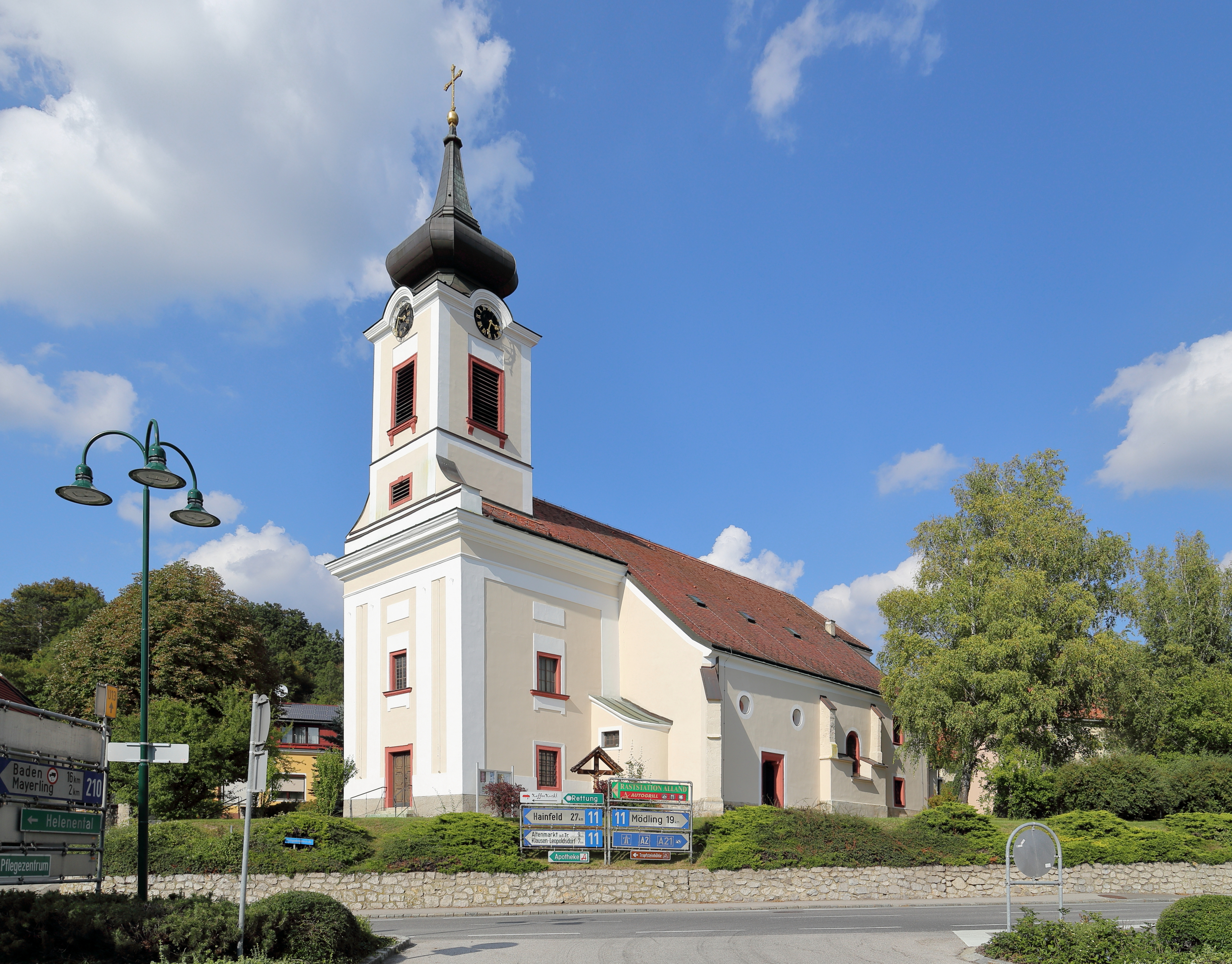 Südansicht der röm.-kath. Pfarrkirche hll. Georg und Margarethe der niederösterreichischen Gemeinde Alland.Ursprünglich eine romanische Saalkirche. Im 12. Jahrhundert wurde diese um ein Nordschiff und einen Westturm erweitert. Im 14. Jahrhundert erfolgte der Anbau der Südostkapelle, die Einwölbung des Nordschiffes sowie der Neubau des Chores. Um 1500 Zubau eines 2. südlichen Seitenschiffjoches und des Südportales. Um 1800 Neubau der oberen Geschosse des Turmes und Barockisierung der Fassade. Im Zuge der Kriegshandlungen 1945 stürzte das zweijochige Mittelschiff und das Südschiff ein und wurde bis 1954 wiederaufgebaut. Bei den zwei Türkenbelagerungen (1529 und 1683) wurde die Kirche ebenfalls schwer beschädigt und jeweils wiederinstandgesetzt.